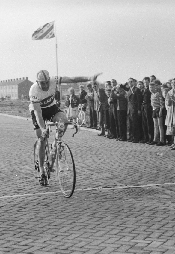 Roger Boens